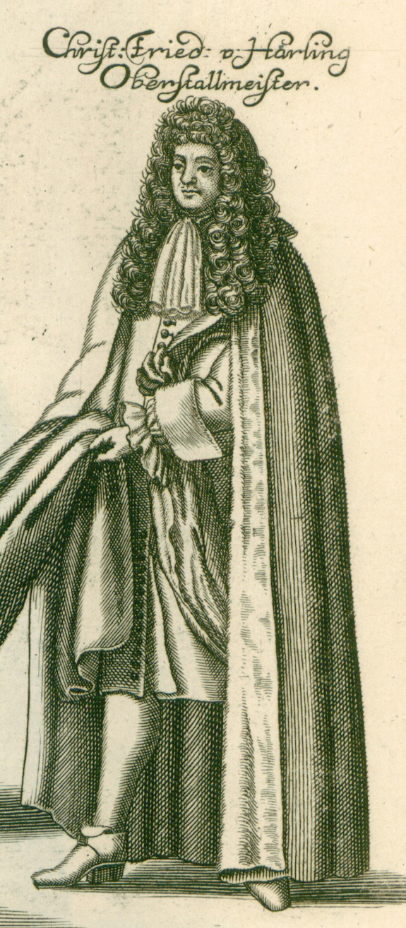 Ausschnitt aus der Platte 66 des Bildbandes „Iusta Funebria Serenissimo Principi Joanni Friderico Brunsvicensium Et Luneburge“ mit der Darstellung des Oberstallmeisters Christian Friedrich von Harling